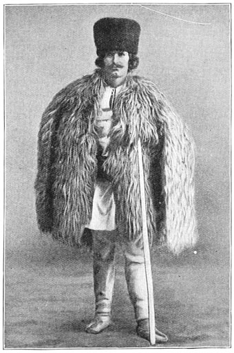 "Roemeensch bergbewoner"